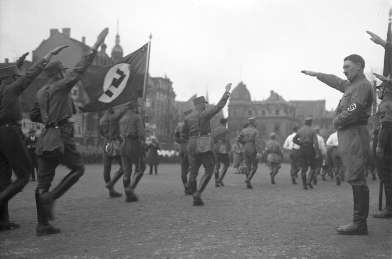 Zu dem Verbot der S.A. der "Privat Armee" Adolf Hitlers! Adolf Hitler der oberste Führer der verbotenen S.A. bei der Abnahme eines Vorbeimarsches in Braunschweig.